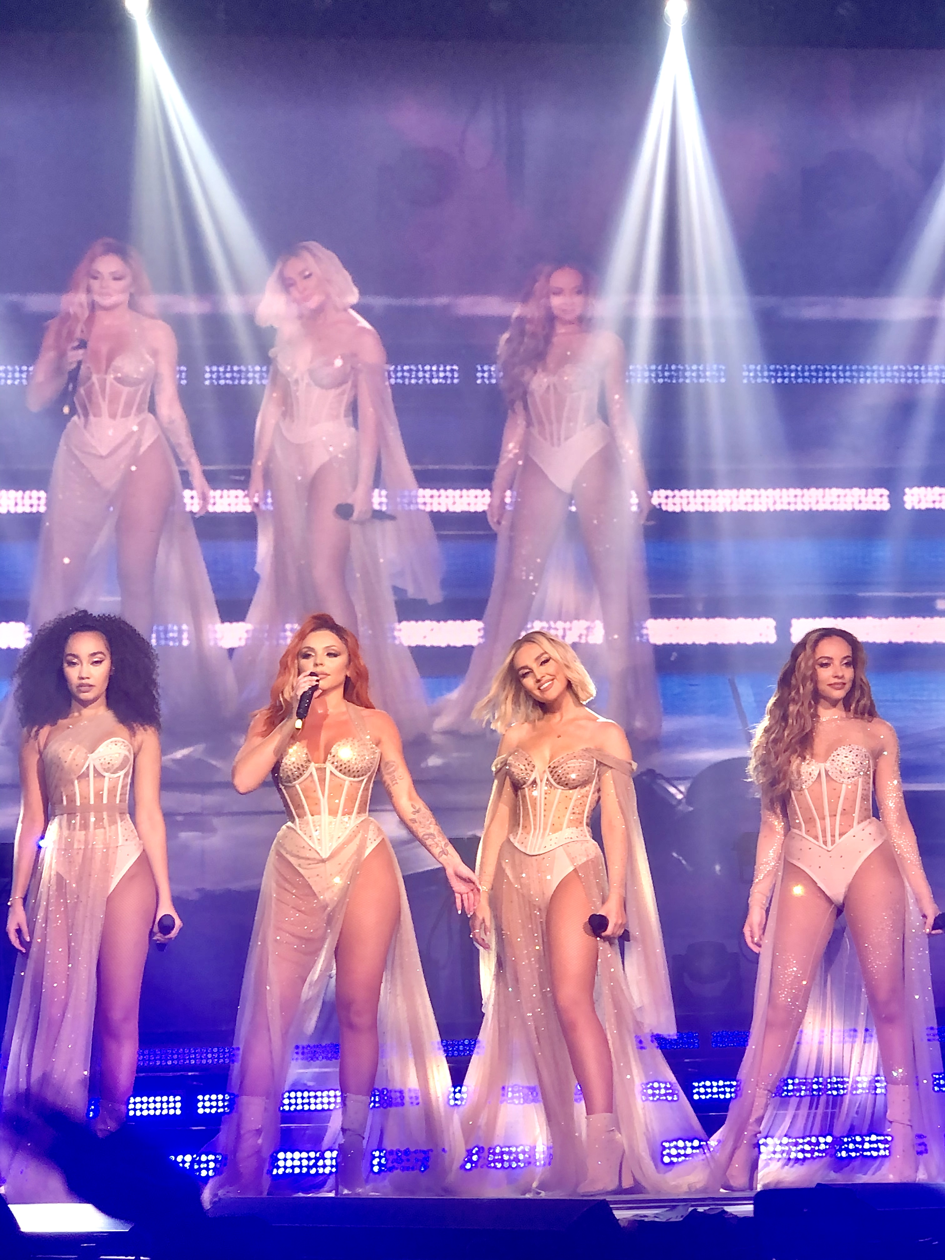 Les Little Mix performant Told You So durant leur concert au Dome De Paris, pendant leur tournée du LM5 tour, le 28 septembre 2019. De gauche a droite, Leigh-Anne, Jesy, Perrie & Jade.